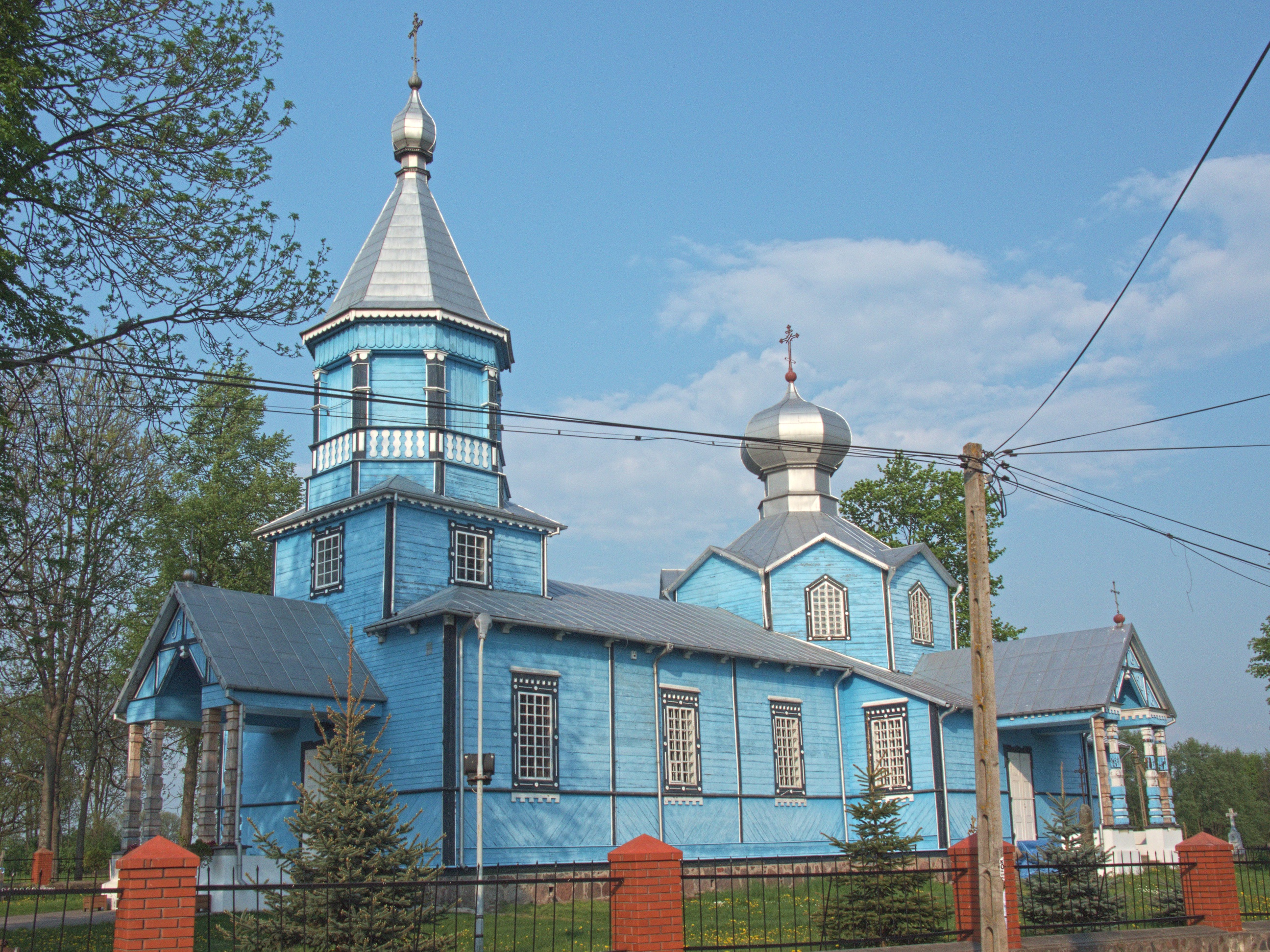 Cerkiew pod wezwaniem Narodzenia św. Jana Chrzciciela w Pasynkach.